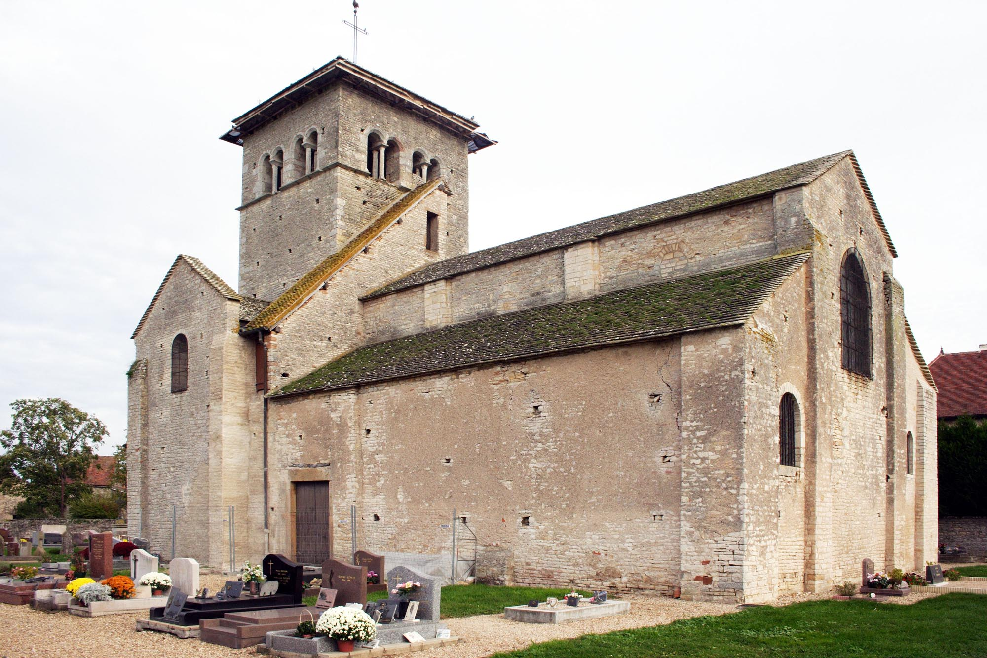 Église romane de Malay, Saône et Loire, Bourgogne, France